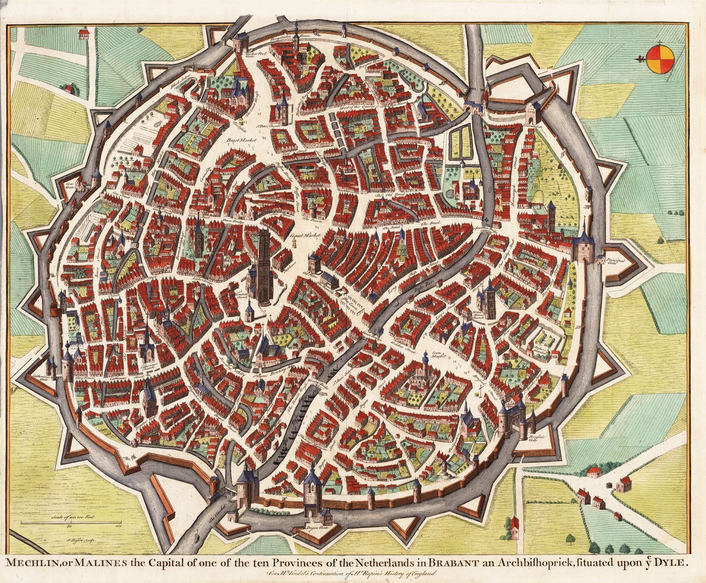 Mechelen Anno 1745